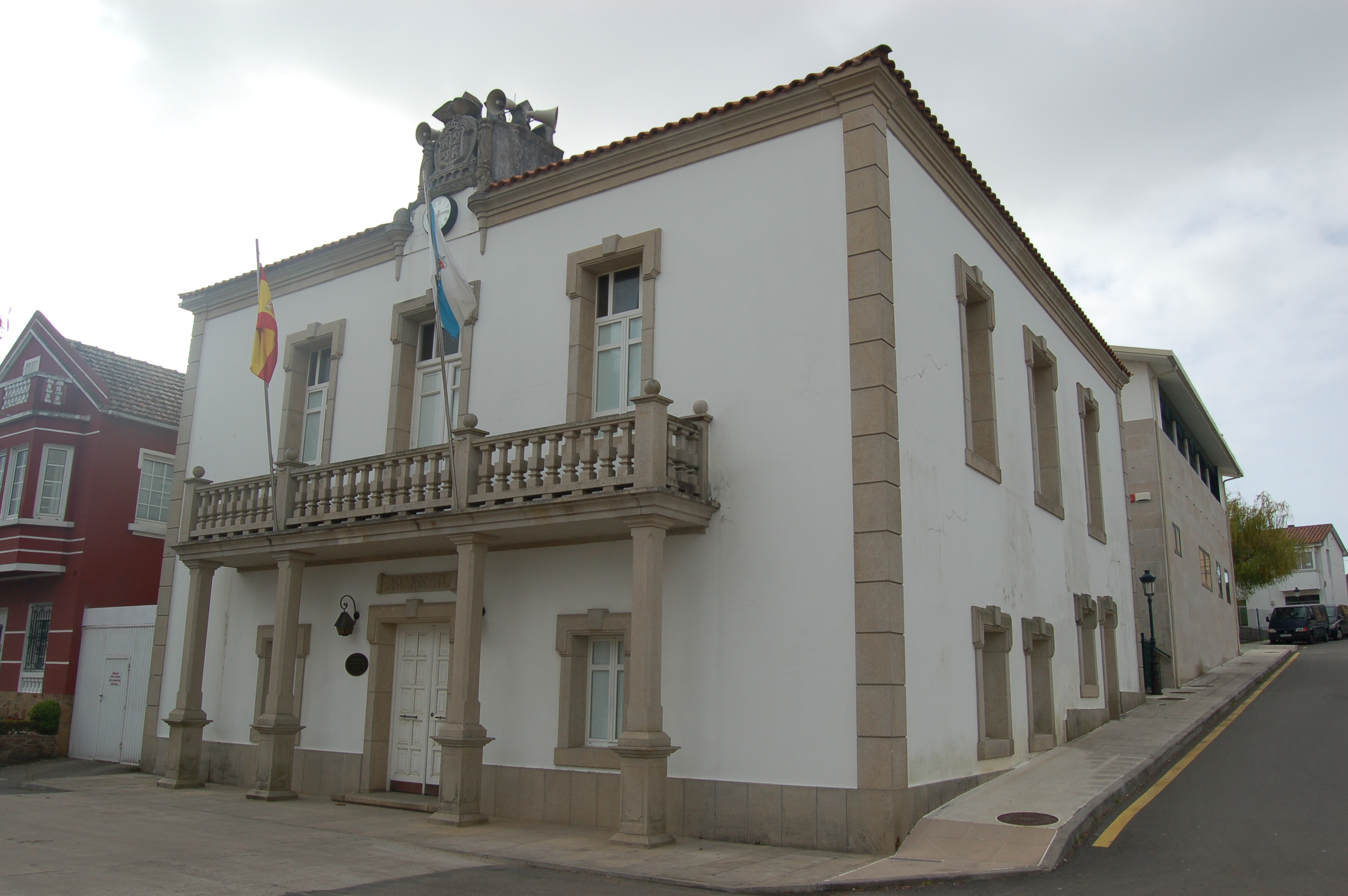 casa consistorial de Ponteceso Ponteceso Categoría:Imaxes de Ponteceso